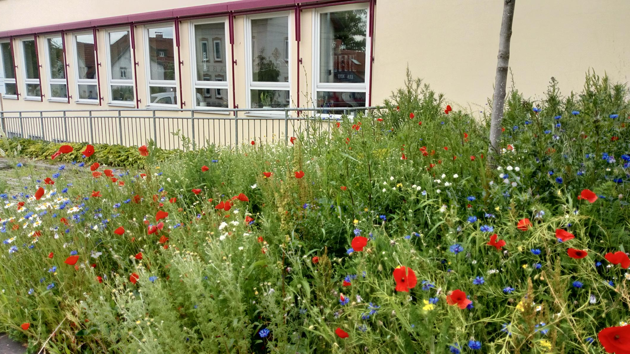 Das Gymnasium alexandrinum hat für seine eigenen Bienen Blühflächen angelegt, insgesamt drei Stück. auf dem Bild ist die Blühfläche zur Straße zu sehen.